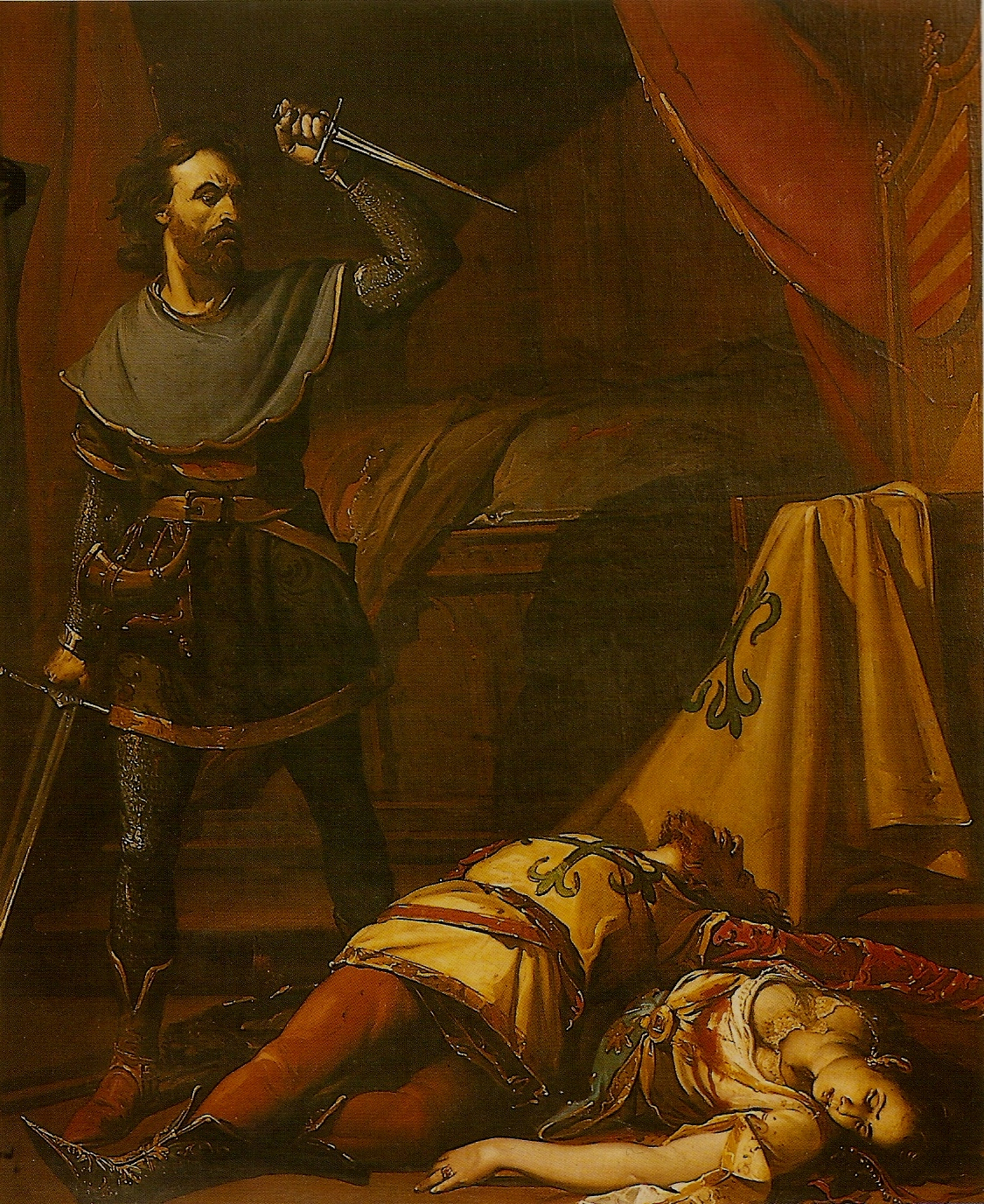 El lienzo representa un hecho histórico, del que derivaría posteriormente la Leyenda de los comendadores de Córdoba, ocurrido en la ciudad de Córdoba en 1448, durante el reinado de Juan II de Castilla. Los hechos históricos auténticos, independientemente de la leyenda posterior, señalan que el protagonista de la leyenda, Fernando Alfonso de Córdoba, caballero Veinticuatro de la ciudad de Córdoba, asesinó a su esposa, Beatriz de Hinestrosa, y a Jorge de Córdoba y Solier, comendador de Cabeza del Buey, que la había seducido. Además asesinó a Fernando Alfonso de Córdoba y Solier, hermano del anterior y comendador de Moral, siendo ambos hermanos caballeros y comendadores de la Orden de Calatrava y primos del asesino. No obstante lo anterior, la leyenda señala, sin fundamento alguno, que Fernando Alfonso de Córdoba mató a su esposa, creyendola adúltera sin fundamento alguno, por lo que, arrepentido, solicitó perdón al rey Juan II, quien según la leyenda le ordenó contruir una torre en Córdoba como expiación por su crimen, llamándose desde entonces dicha torre la Mal-muerta. No obstante, la torre de la Malmuerta fue construída en realidad entre 1404 y 1408, durante el reinado de Enrique III de Castilla.